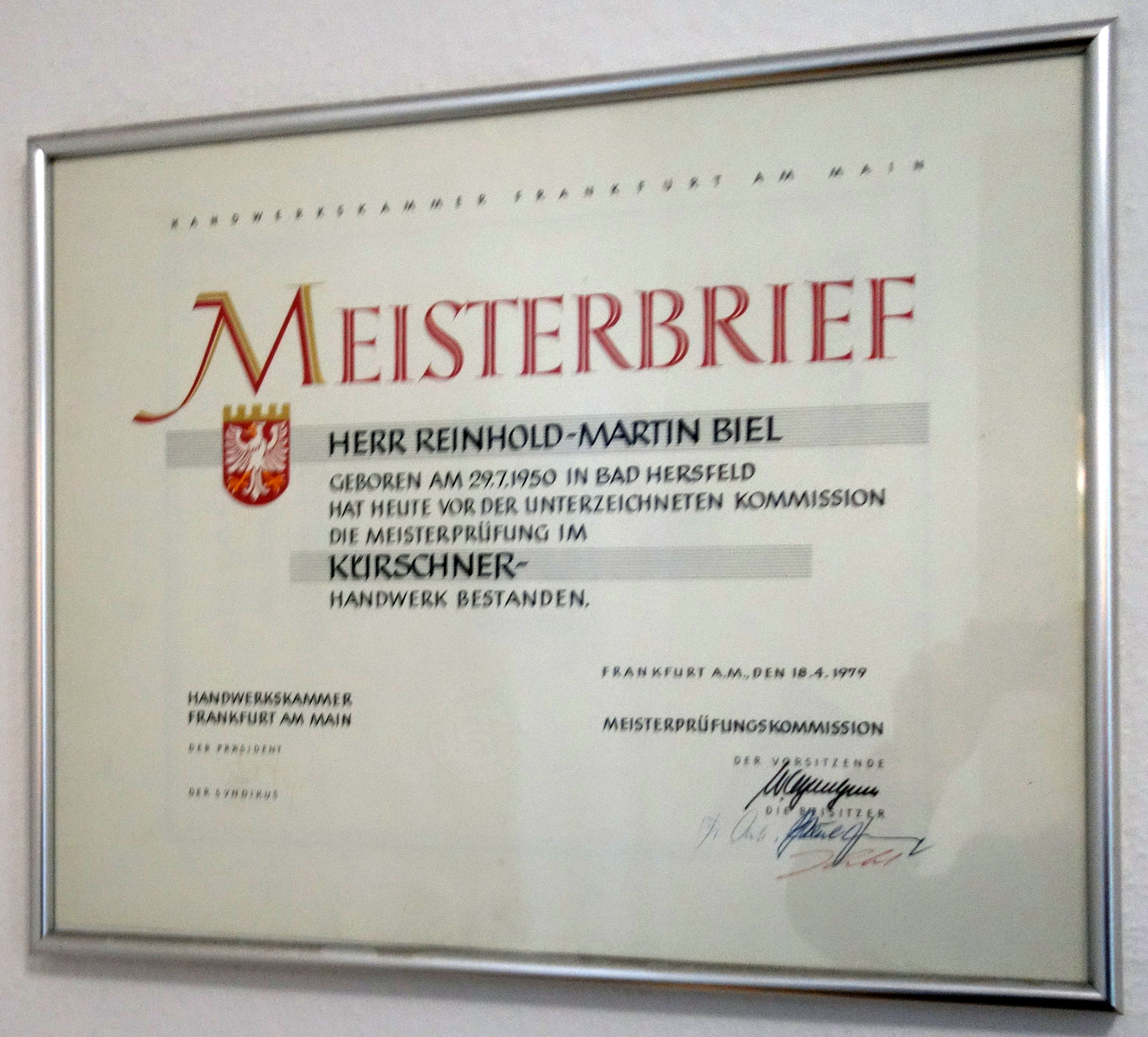 Biel Pelze, Bad Hersfeld. Meisterbrief im Kürschnerhandwerk, Reinhold-Martin Biel, Frankfurt am Main, 18. April 1979.